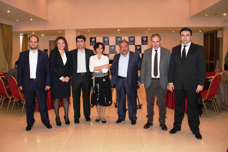 Քաղաքացիական պայմանագիր